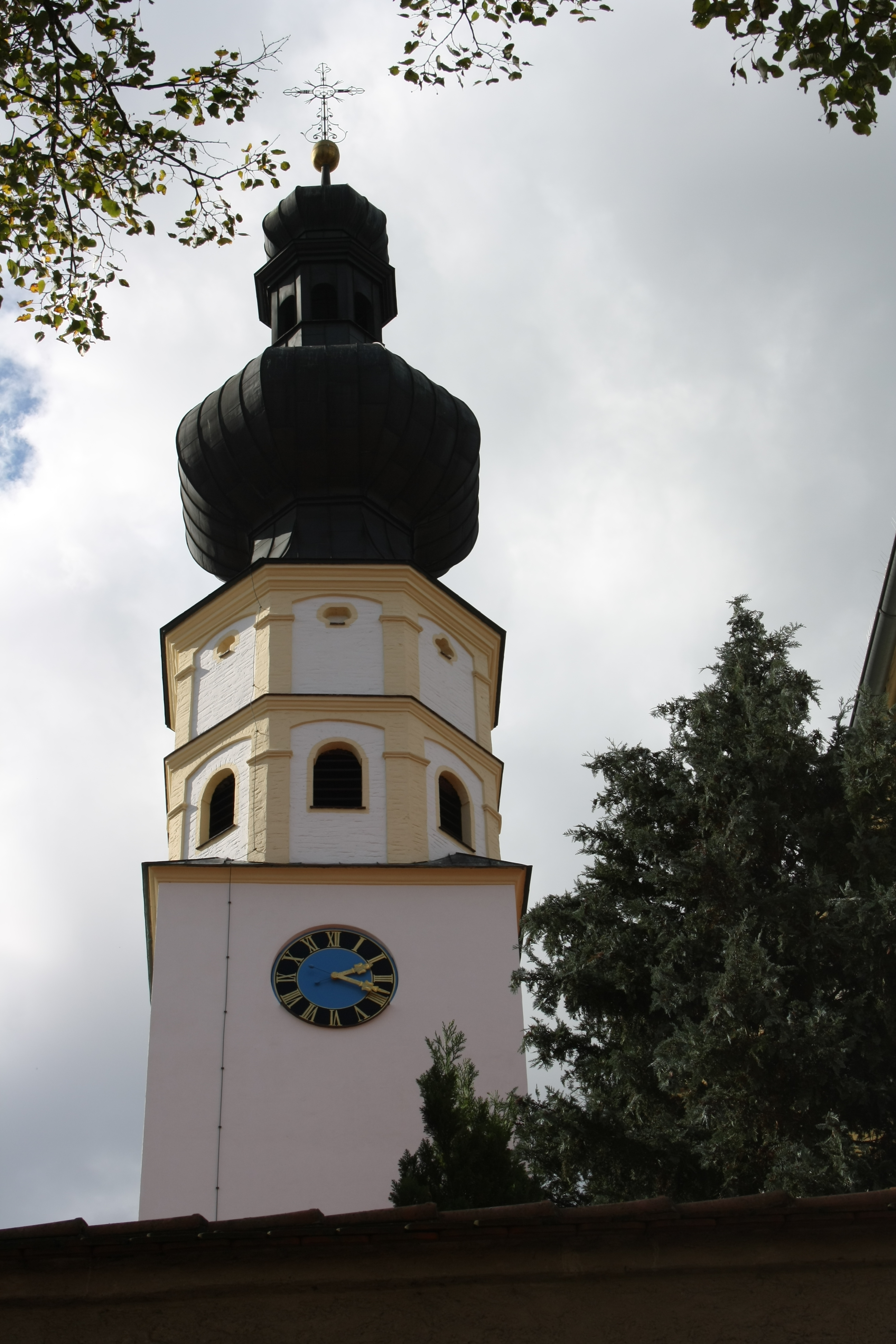 Katholische Pfarrkirche St. Vitus in Donaualtheim (Dillingen an der Donau), Turm mit Doppelzwiebelkuppel